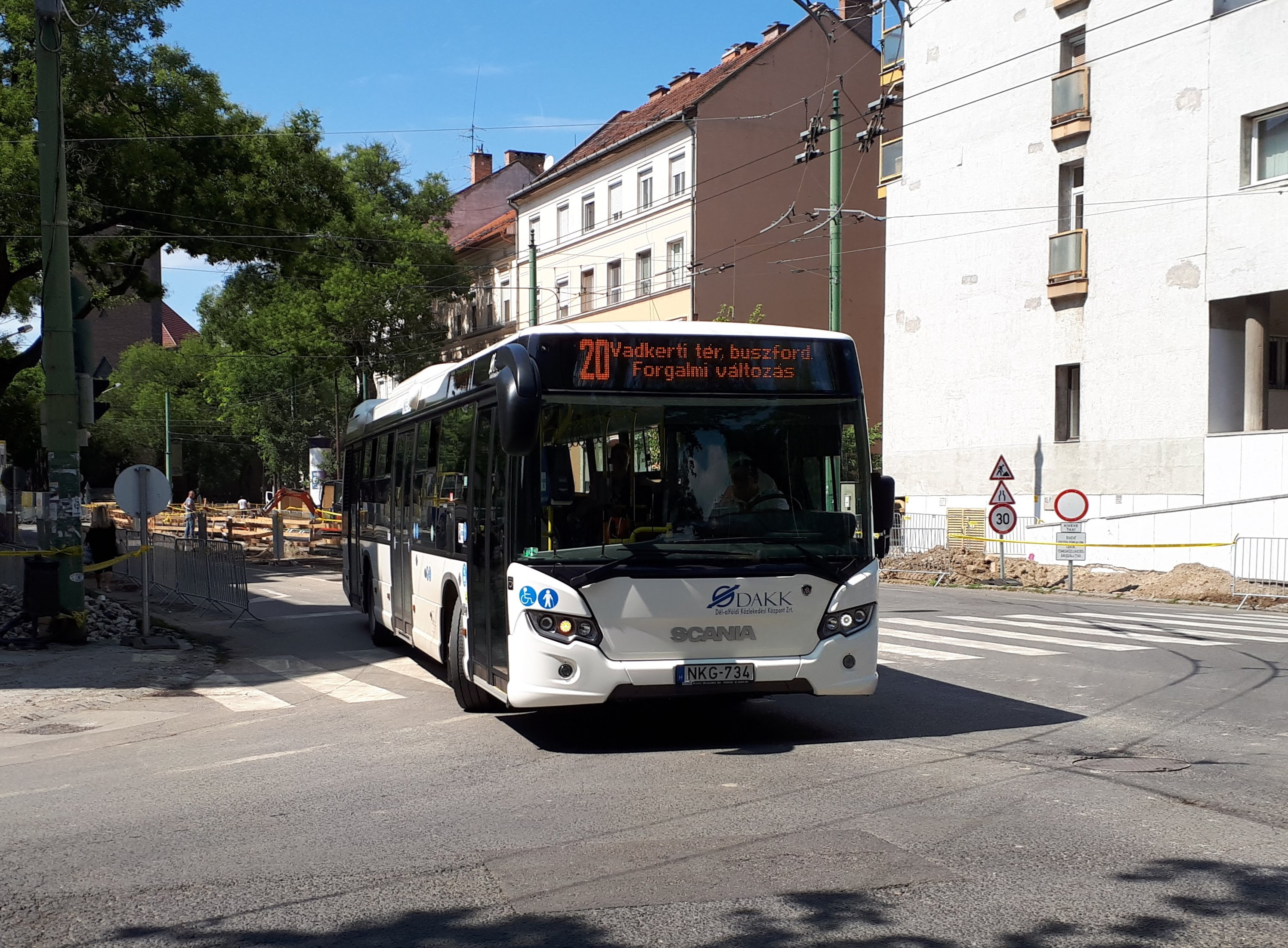 A DAKK NKG-734 rendszámú Scania Citywide típusú busza Szegeden, a 20-as helyi járaton.